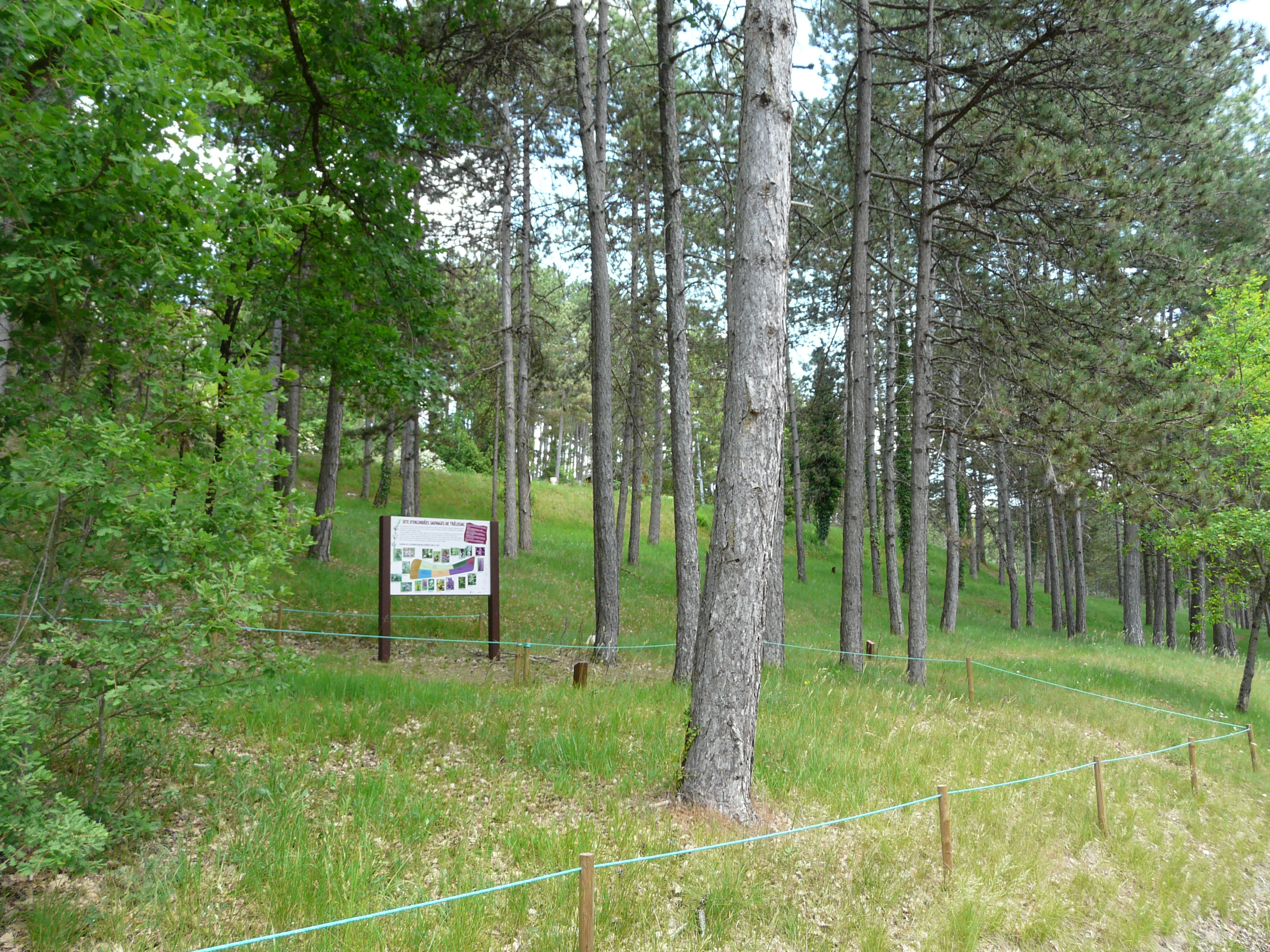 Le site d'orchidées sauvages de Trélissac, Dordogne, France.